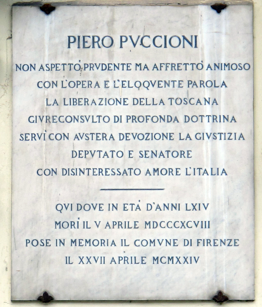 Piazza d'azeglio 35 villino puccioni, targa piero puccioni 2